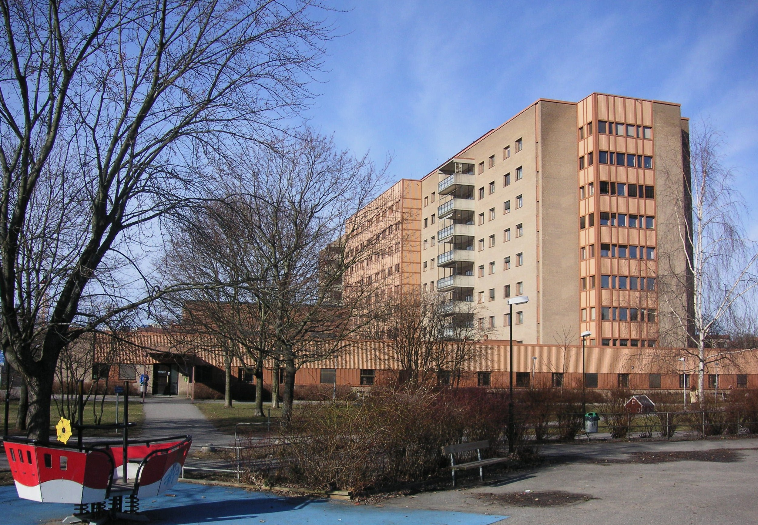 Dalens sjukhus, Enskede, Stockholm